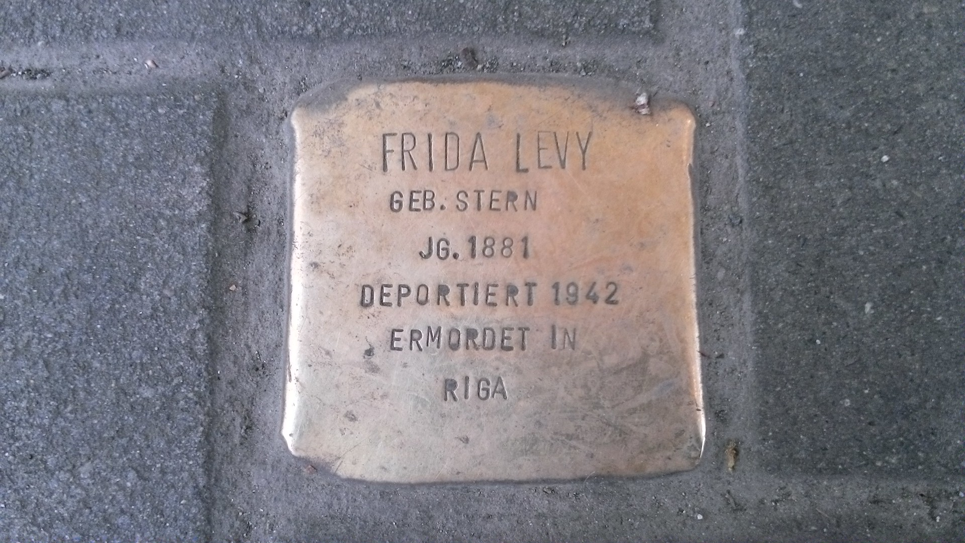 Frida Levy, geb. Stern, deportiert 1942, ermordet in Riga